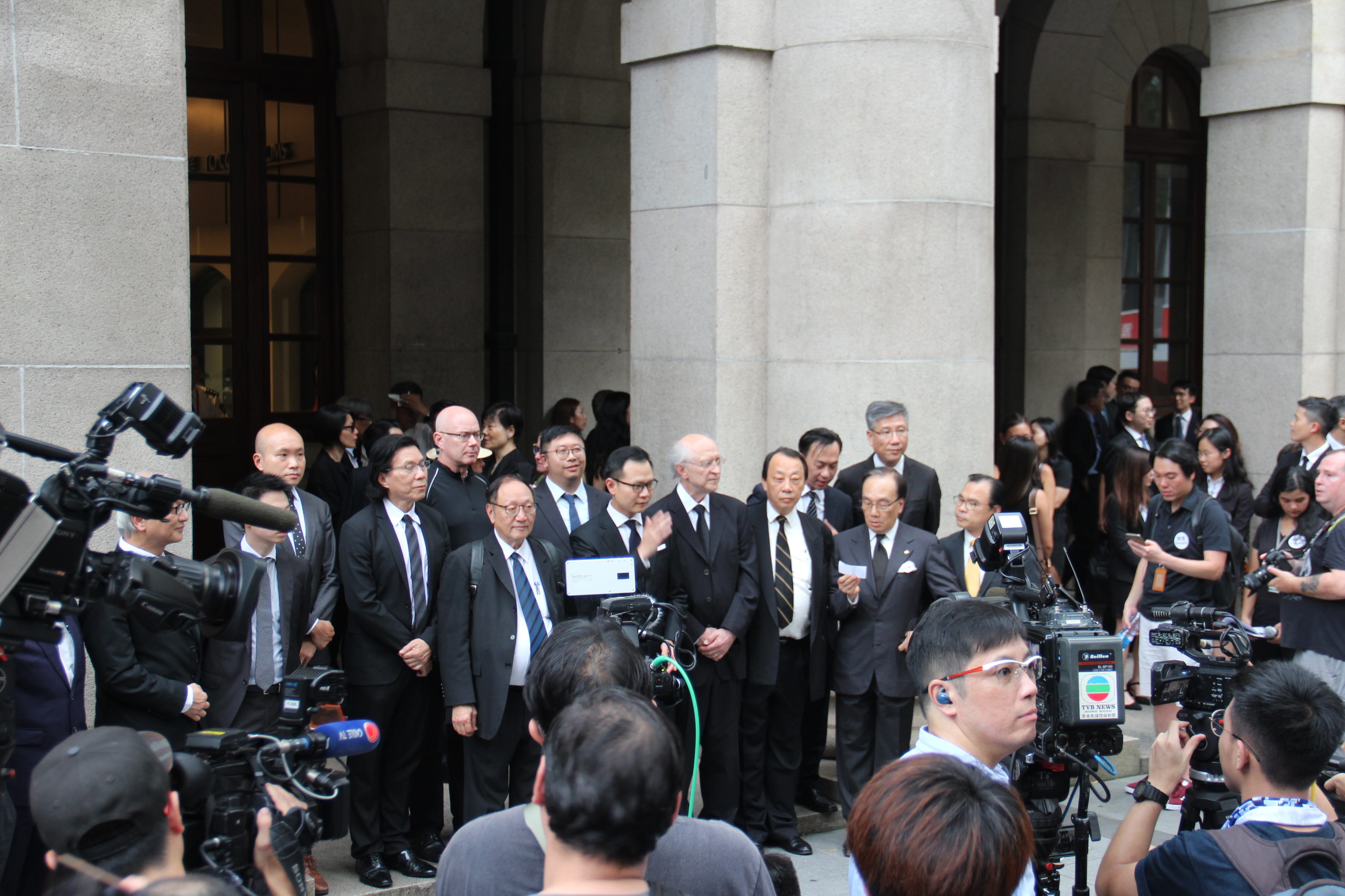 Hong Kong lawyers march against China extradition plans